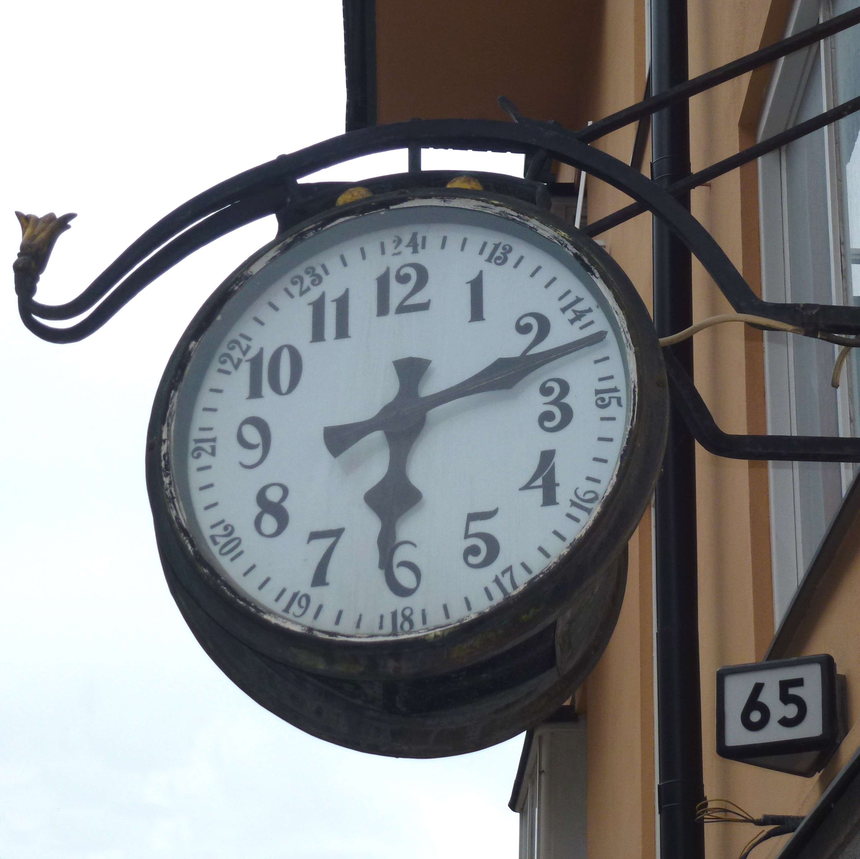 Fasadur för Sandströms Urmakeri (numera nedlagd) Hantverkargatan 65